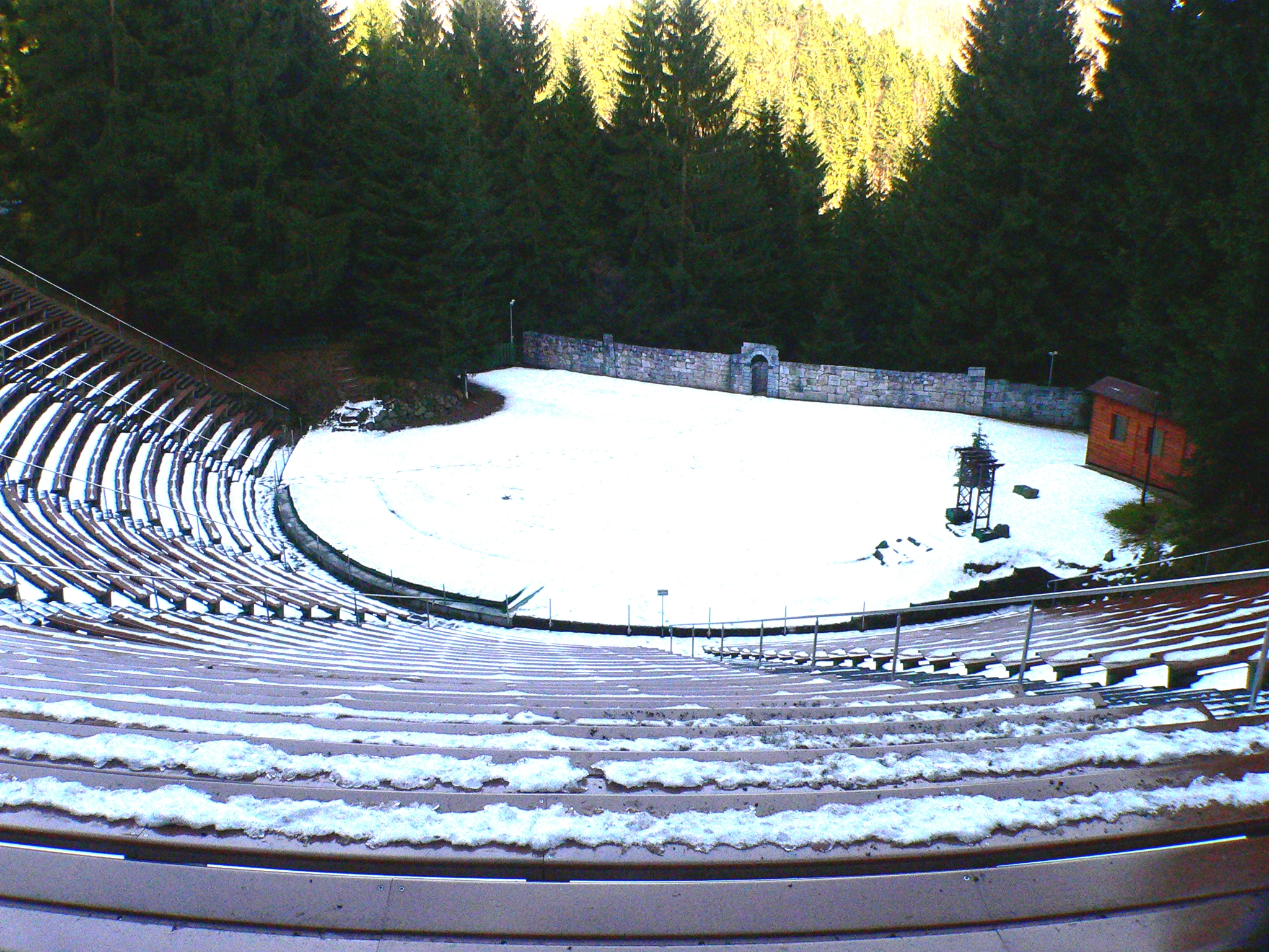 Naturbühne Steinbach-Langenbach in Schleusegrund, Thüringer Wald, Tribüne und Bühne